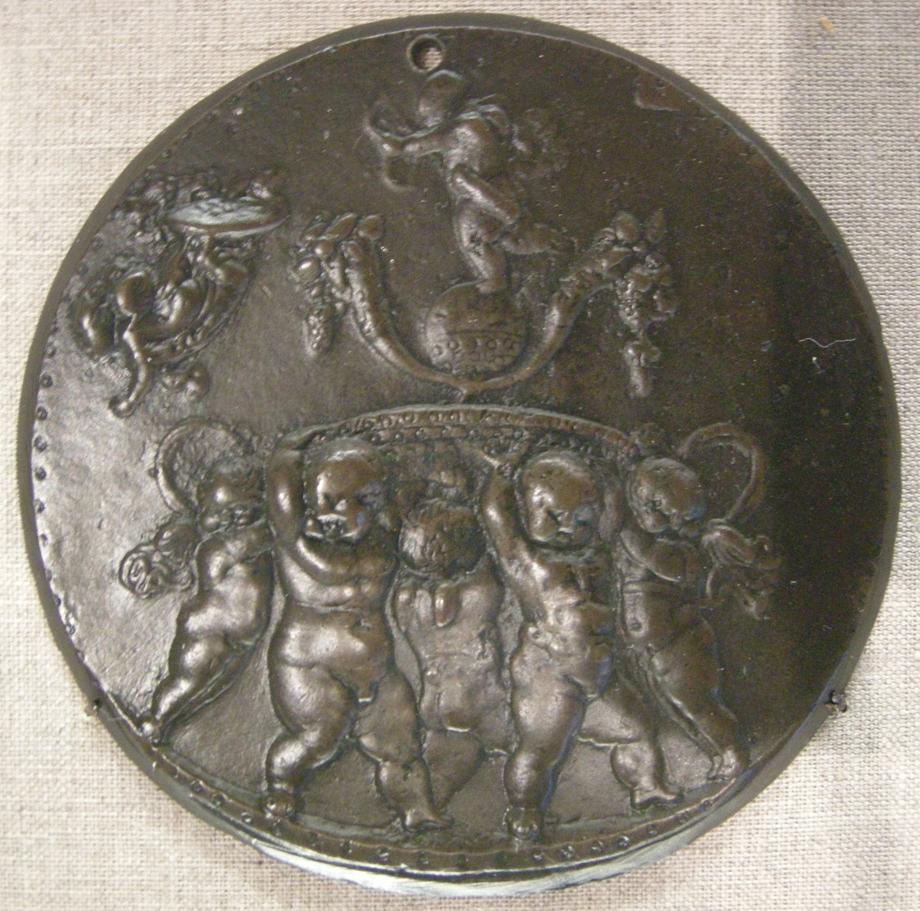 Francesco di giorgio, il trionfo di cupido, 1472-74